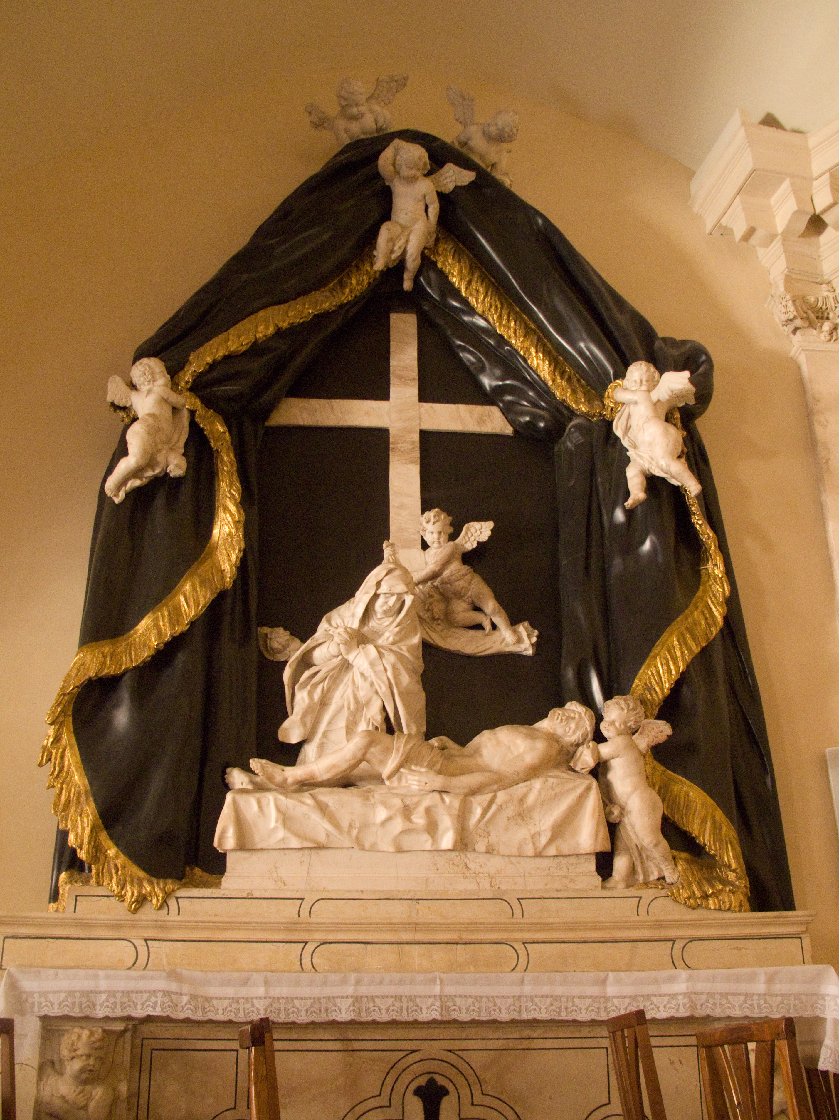 Vicenza - Chiesa di San Vincenzo - Altare della Pietà, di Orazio Marinali